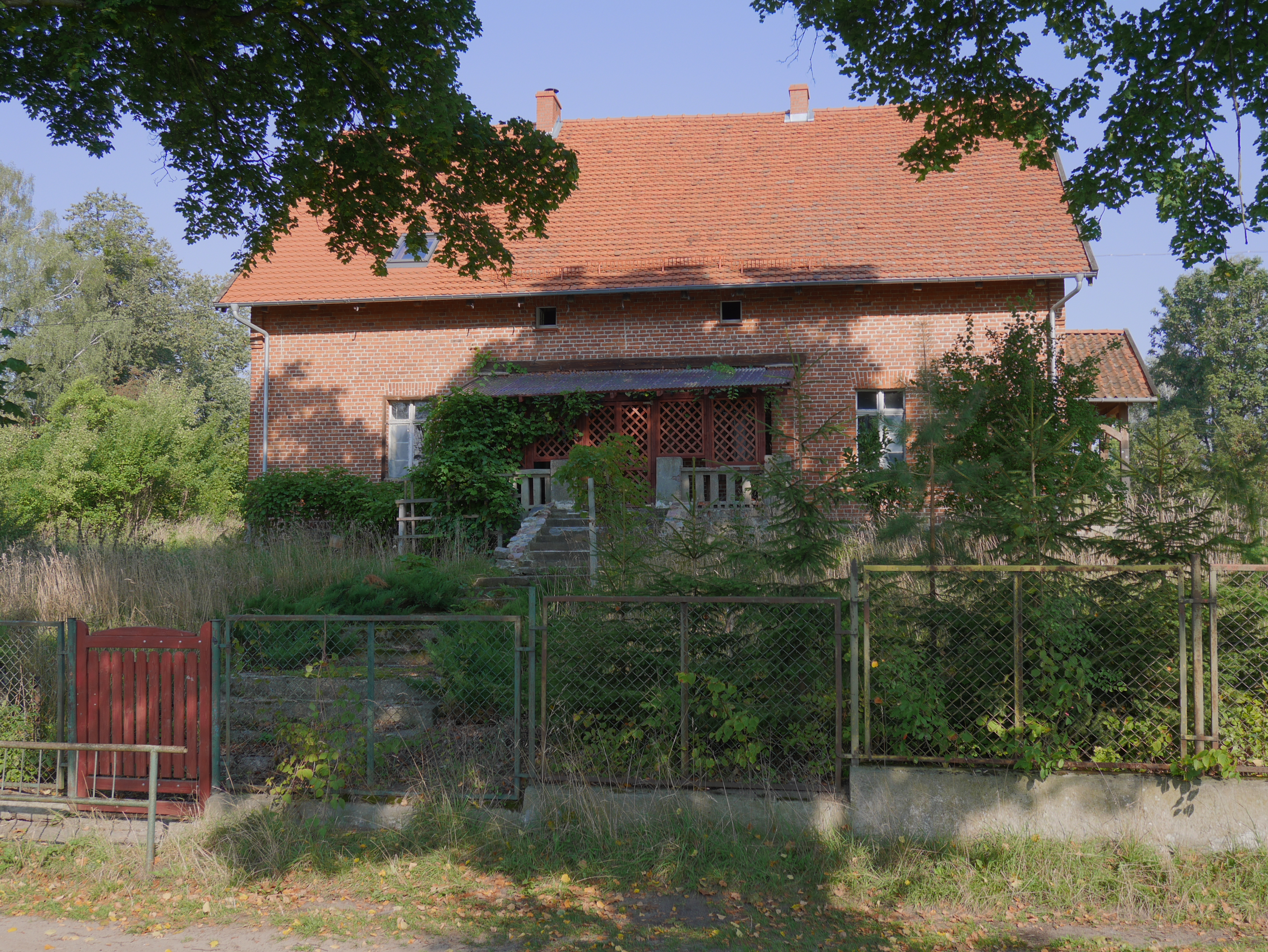 Boreczno, pastorówka